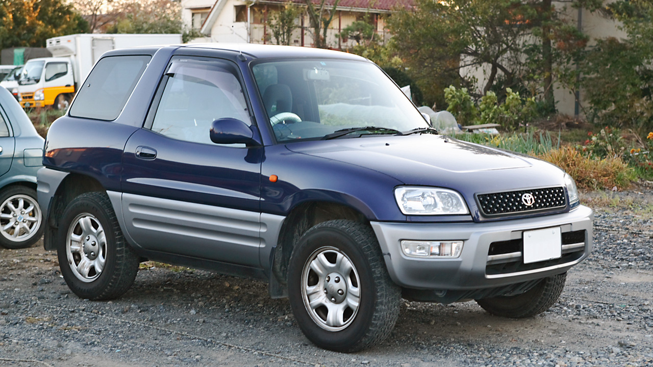 1997 - 2000 Toyota RAV4